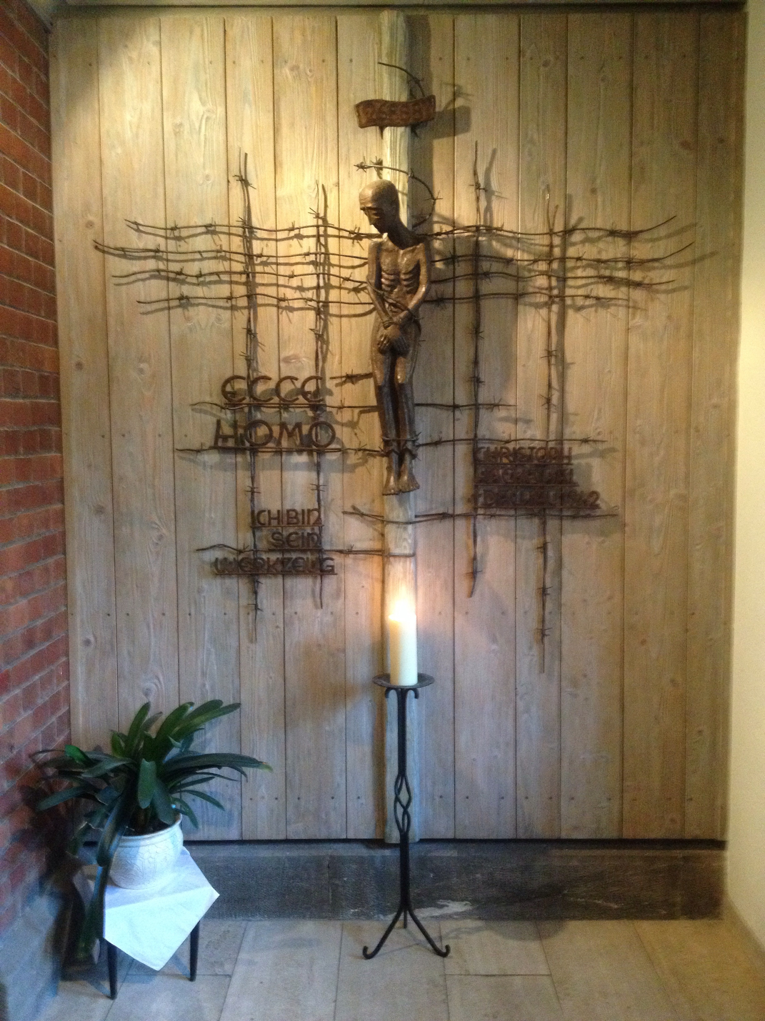 Bündheim (Bad Harzburg), kath. Kirche, Gedenkort für Christoph Hackethal, Pfarrer in Bündheim von 1934 bis zur Verhaftung 1941, gestorben in Dachau am 25. August 1942 ([1])